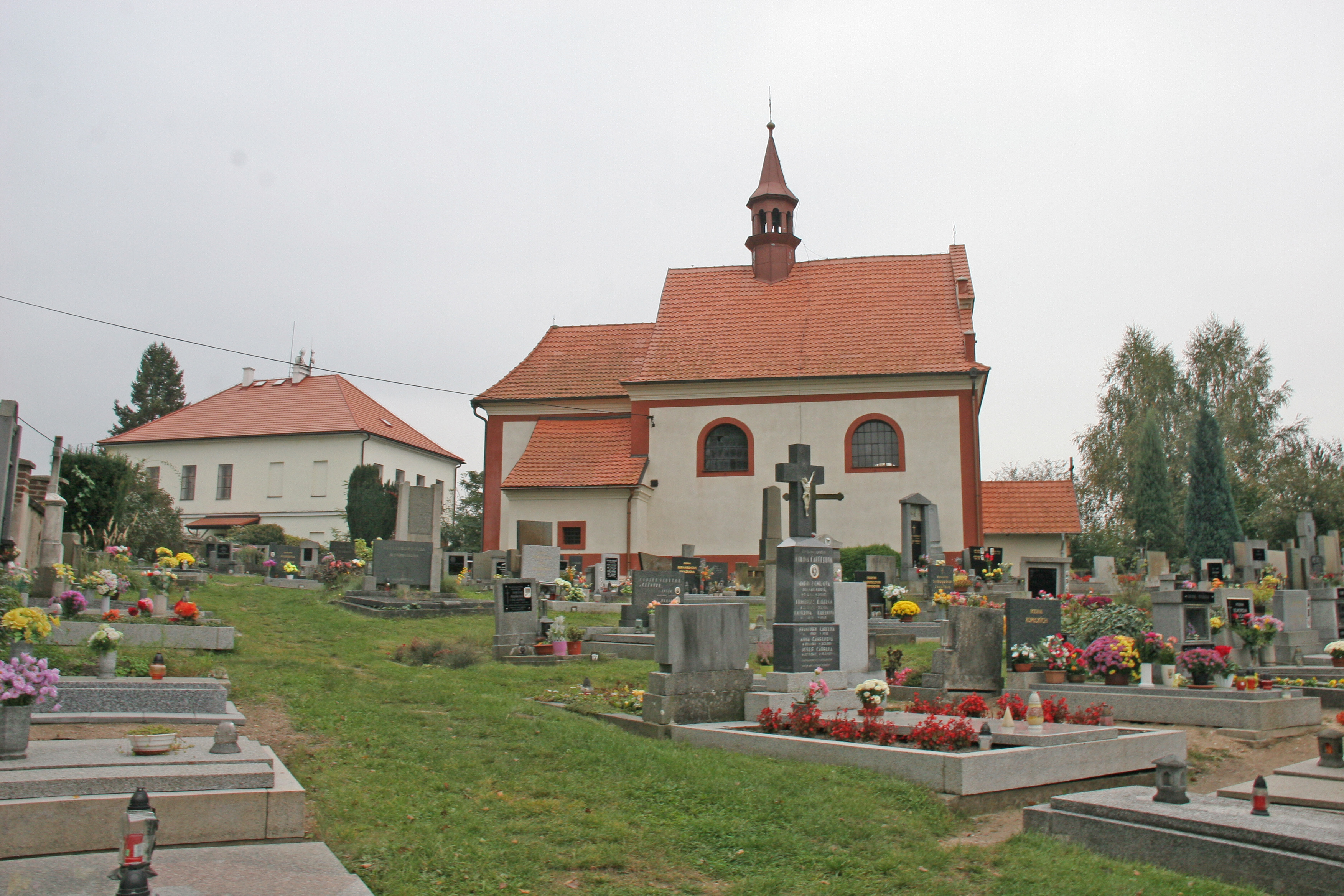 Kostel svatého Havla, Rasochy.